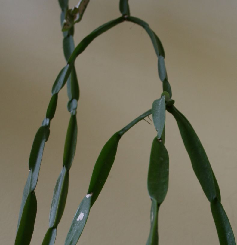 Rhipsalis paradoxa kaktusz hajtása